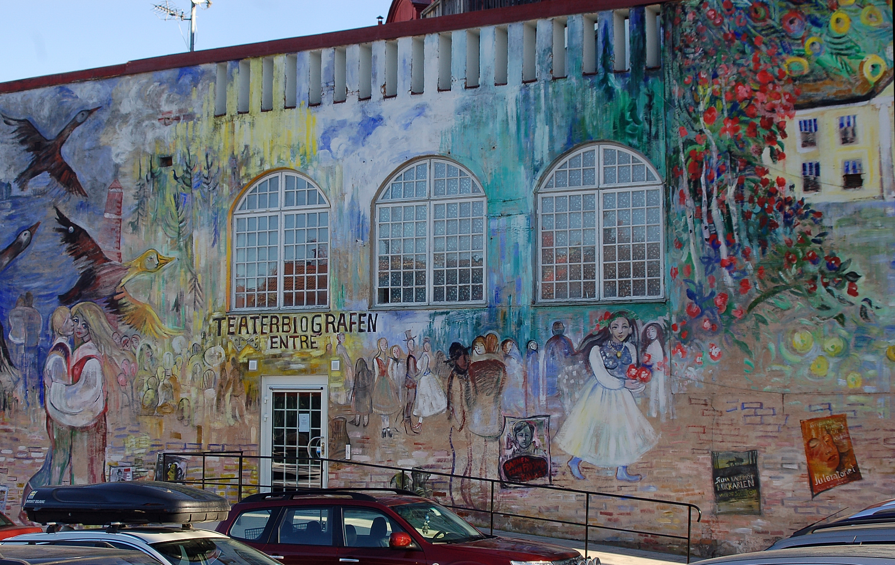 Väggdekoration utförd på Teaterbiografen i Sunne av Marja i Myrom.